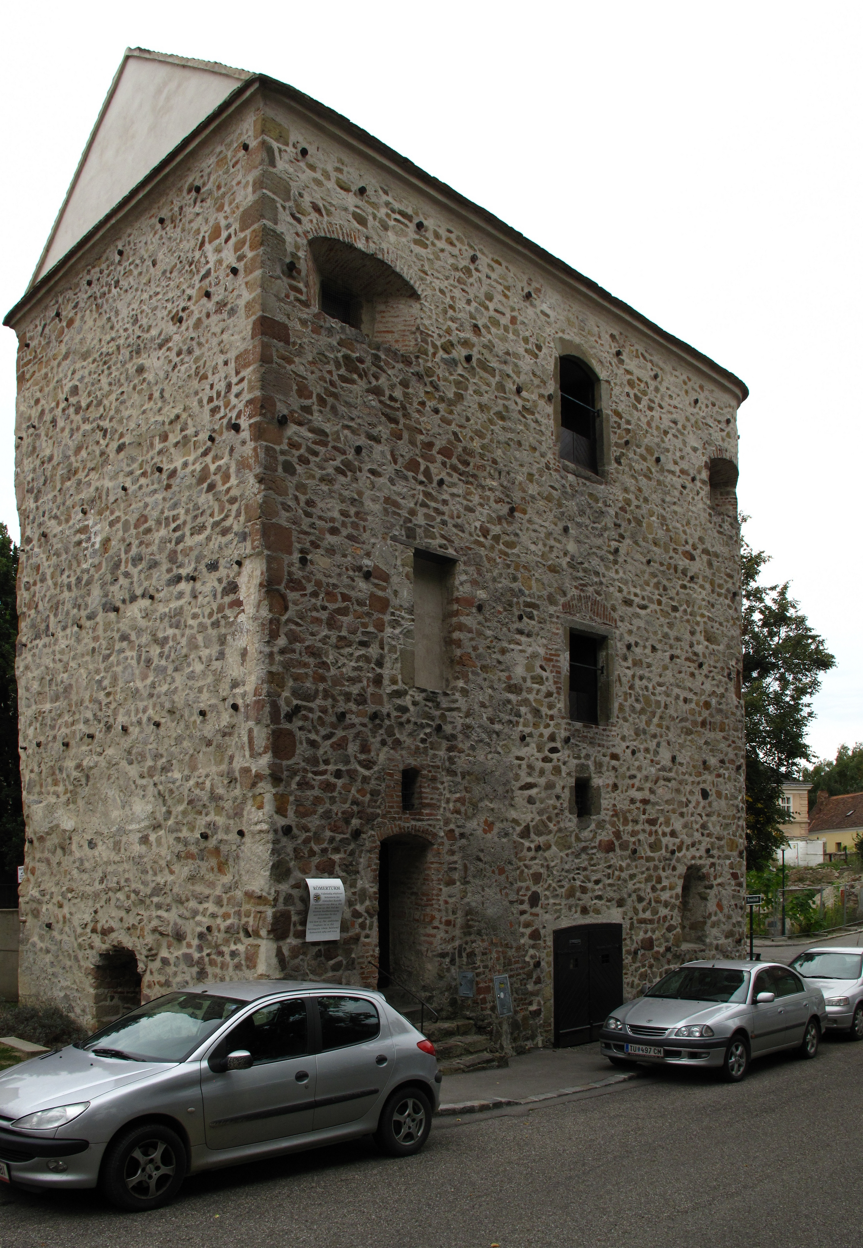 Salzturm, Römerturm, 3430 Tulln an der Donau, Donaulände, Tulln 38